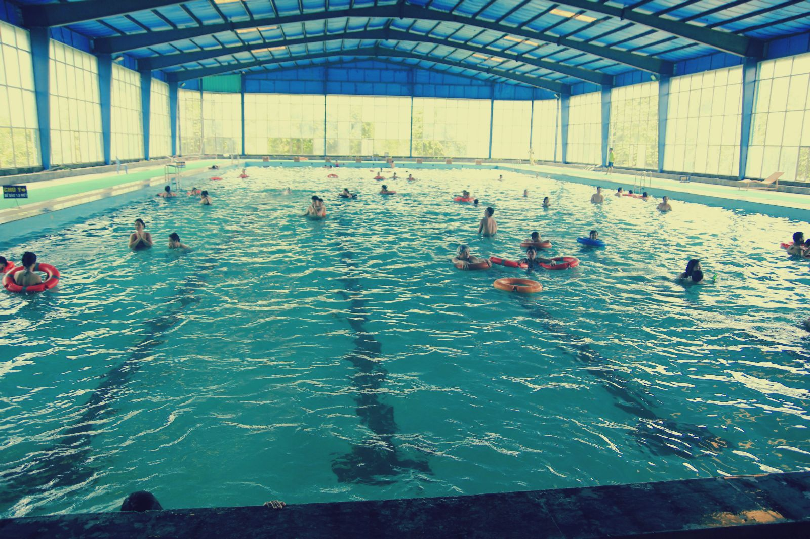 Công ty du lịch Khoang Xanh Suối Tiên - Vân Hòa, Ba Vì, Hà Nội